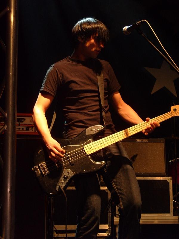 Amak ze Sunshine během koncertu (leden 2008)